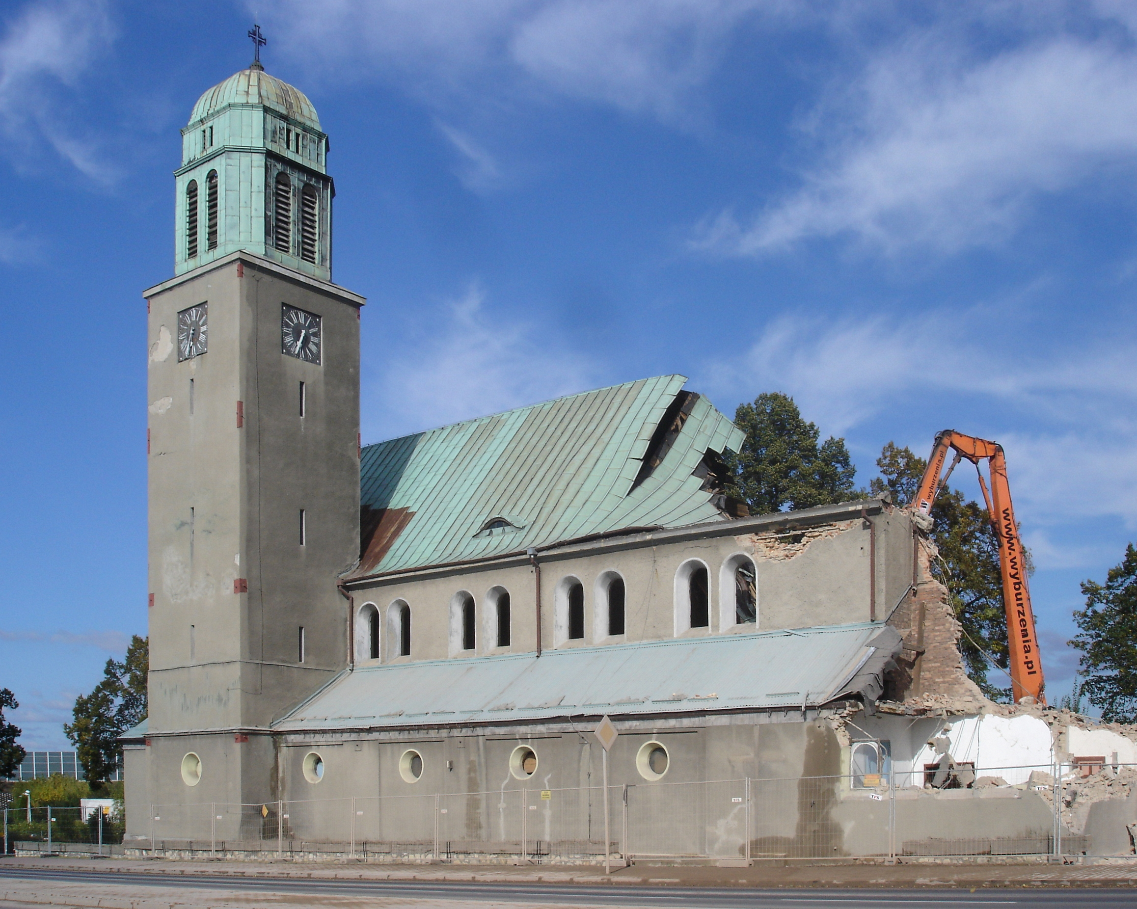 Wyburzanie kościoła św. Józefa w Bytomiu-Dąbrowie Miejskiej.